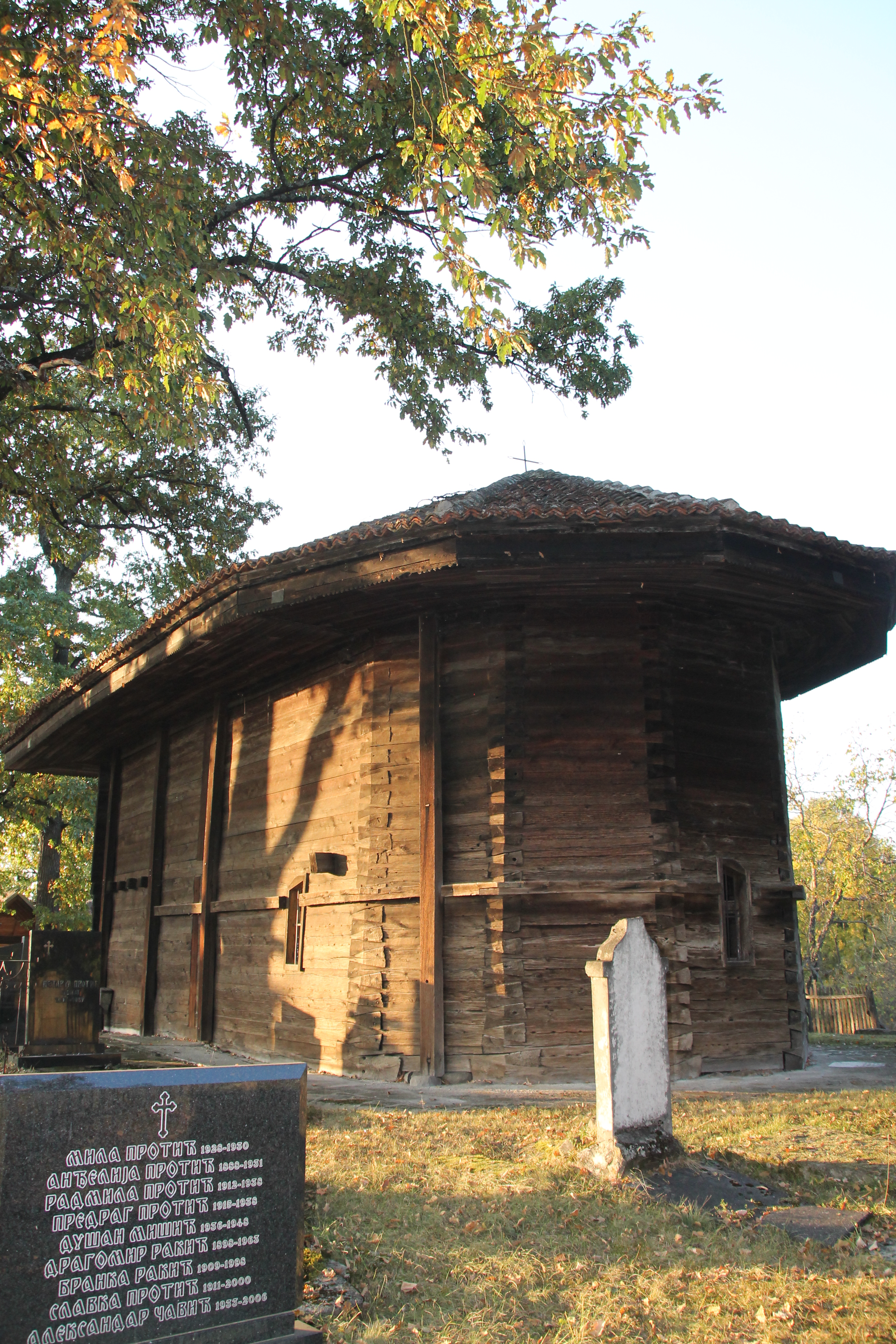 Crkva brvnara (Cvetke)